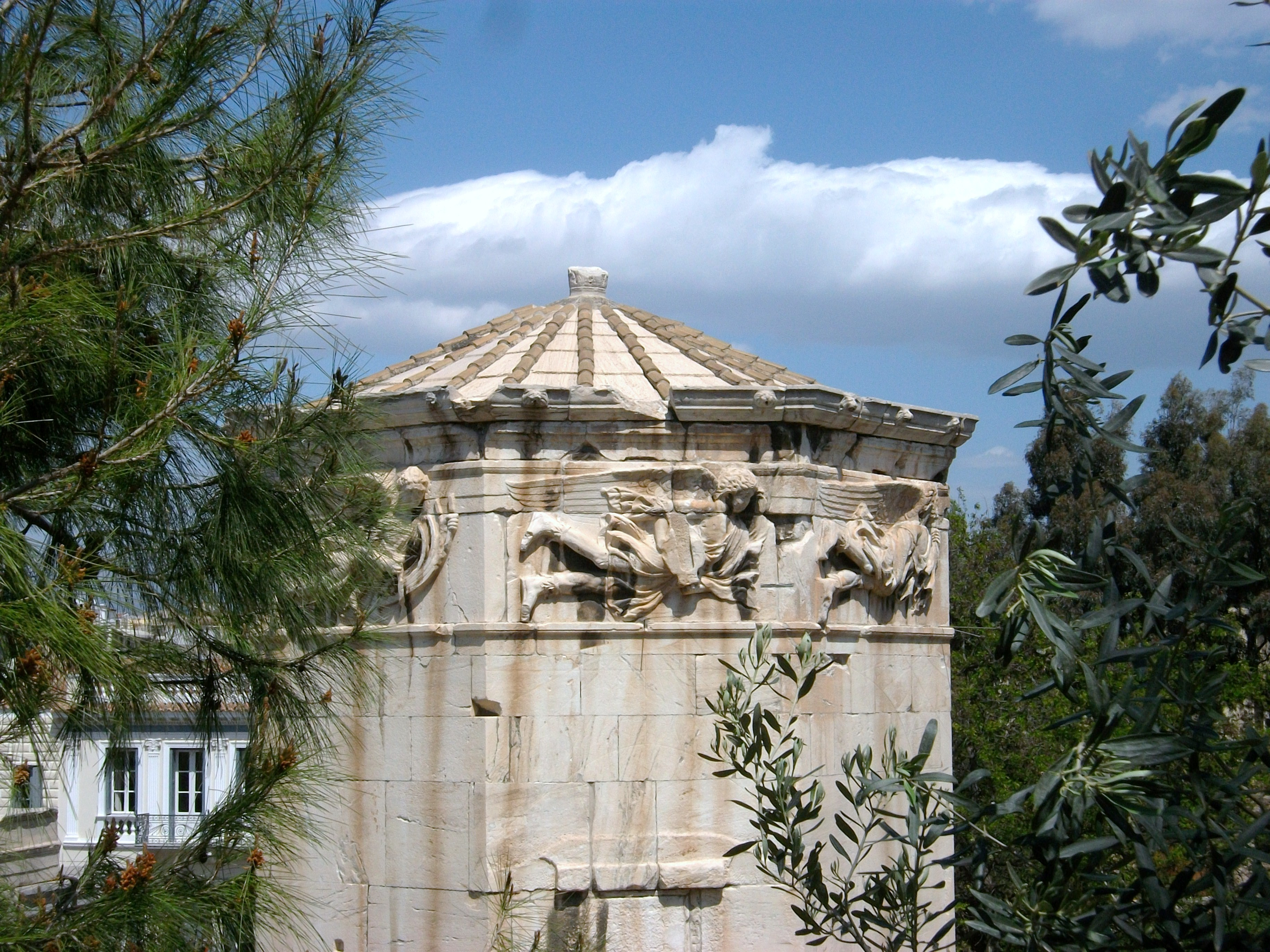 Torre dels vents, part superior.